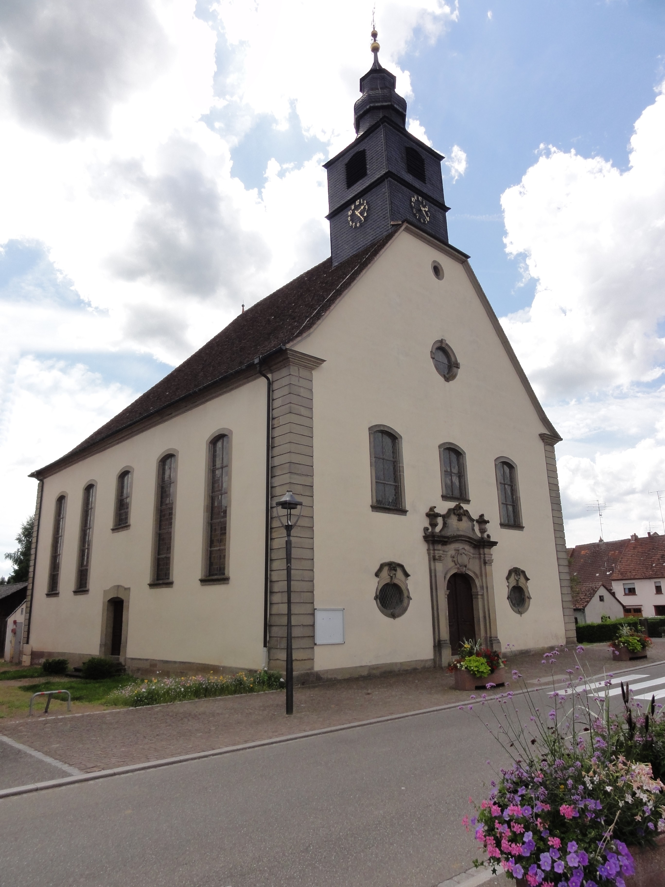 Alsace, Bas-Rhin, Église protestante de Harskirchen (PA00084744, IA67005797).